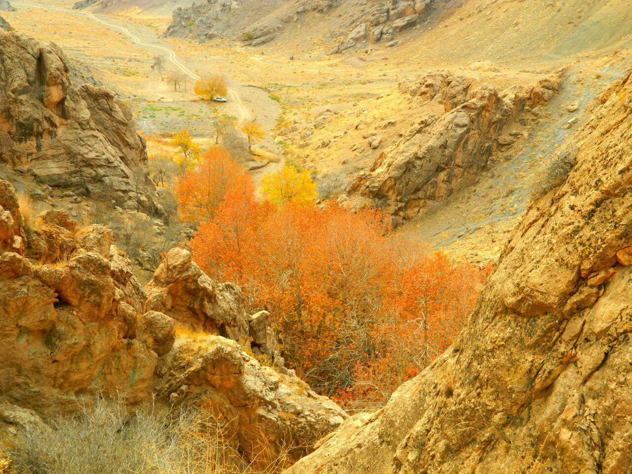 عکاس: علی سلیمانی (حسین اصغر)